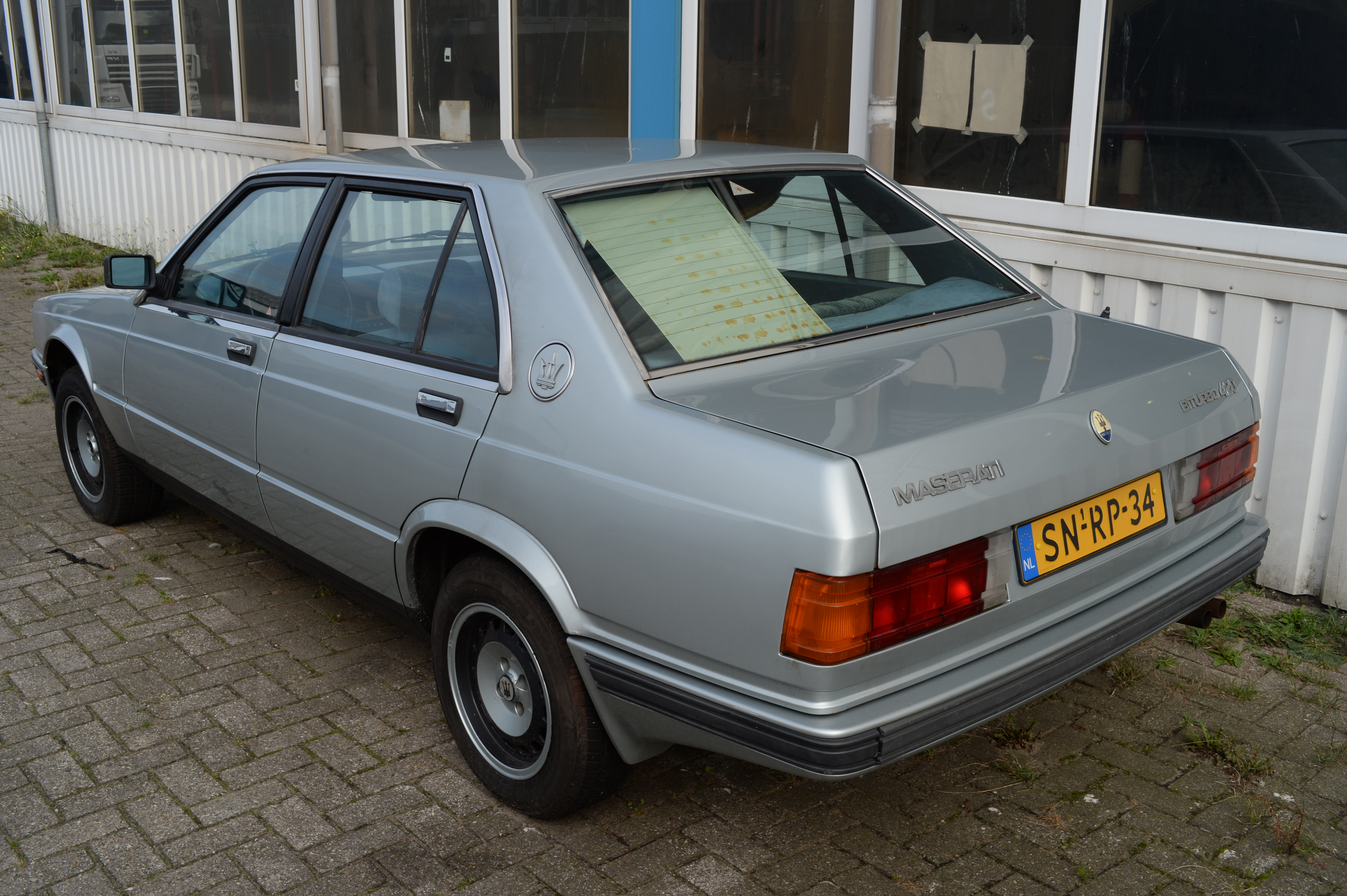 1986 Maserati Biturbo 420